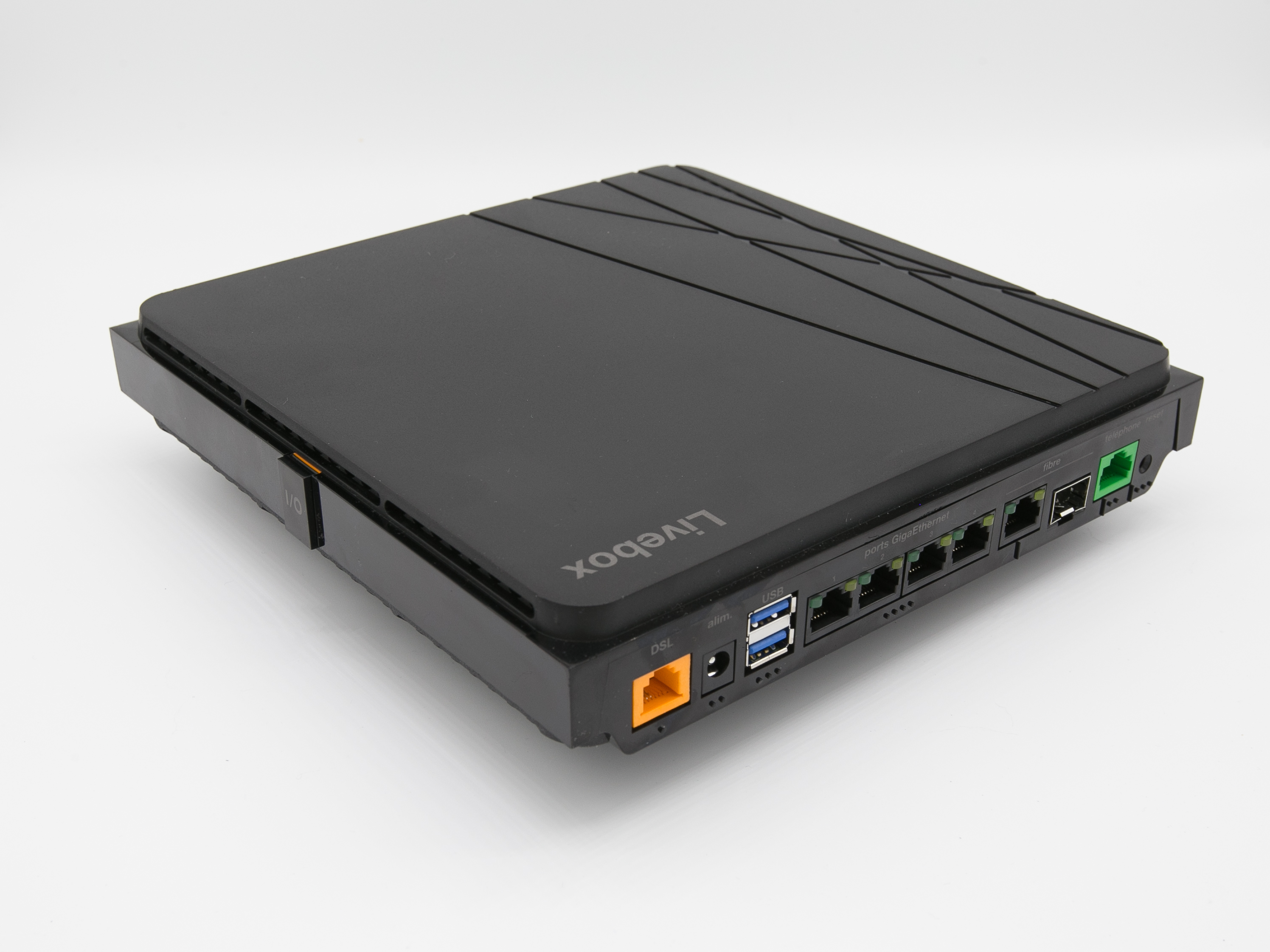 Libebox V4 d'Orange